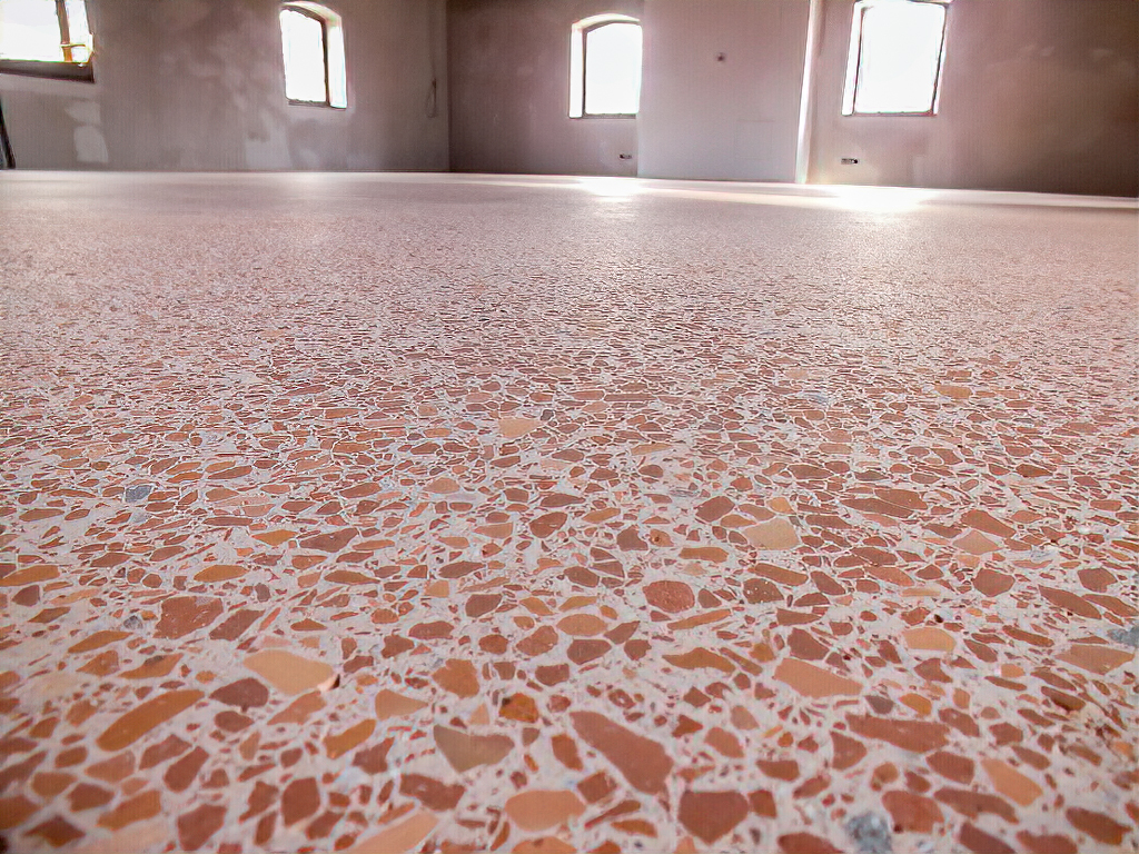 Rekonstruktion eines römischen Opus Signinum. Größte Rekonstruktion in Europa. Ort: Europäischer Kulturpark Bliesbruck Reinheim; Hersteller des Bodens: Peter Hess Quelle